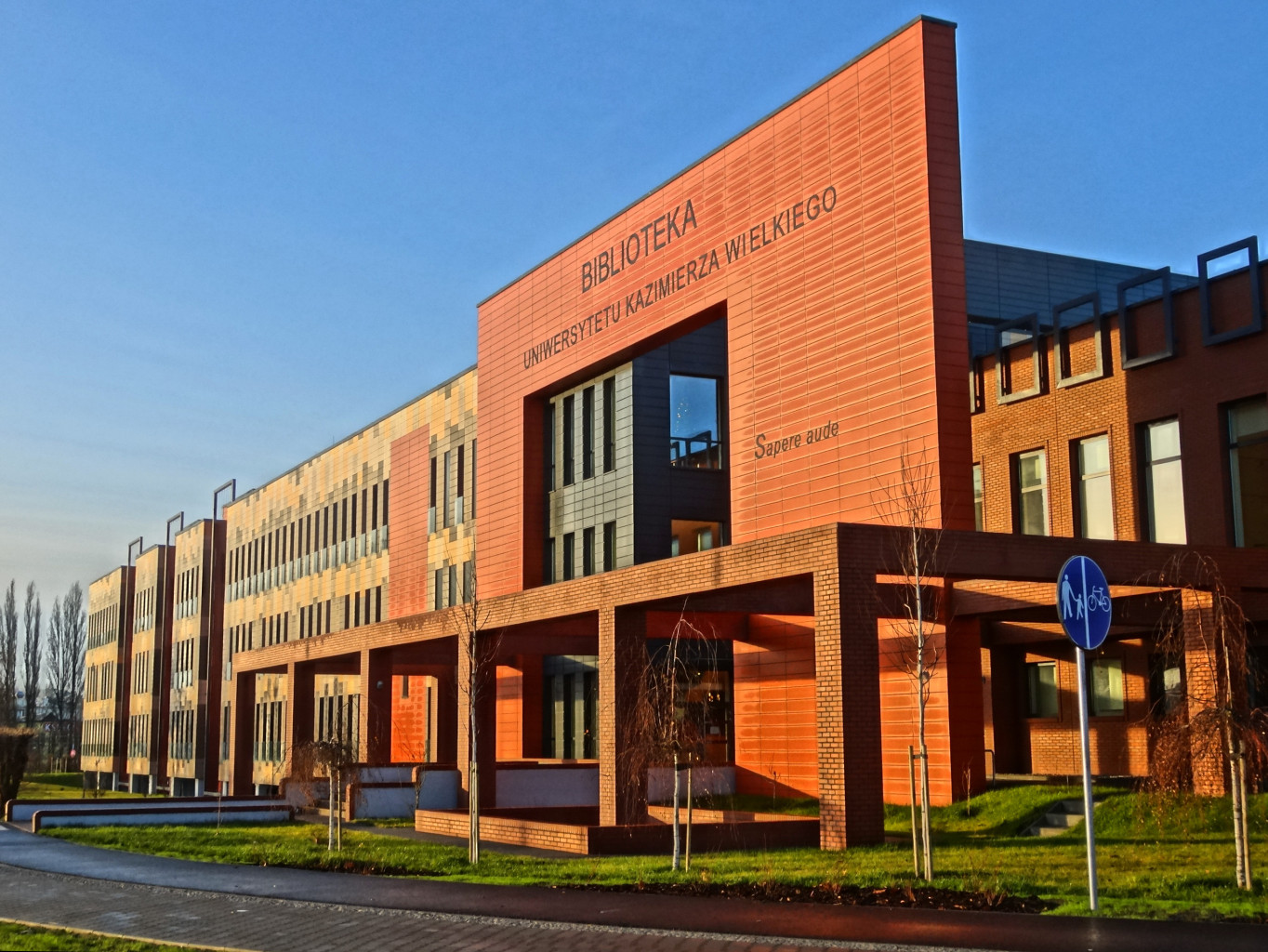 Biblioteka Uniwersytetu Kazimierza Wielkiego (zbud. 2012) przy ul. Ogińskiego w Bydgoszczy